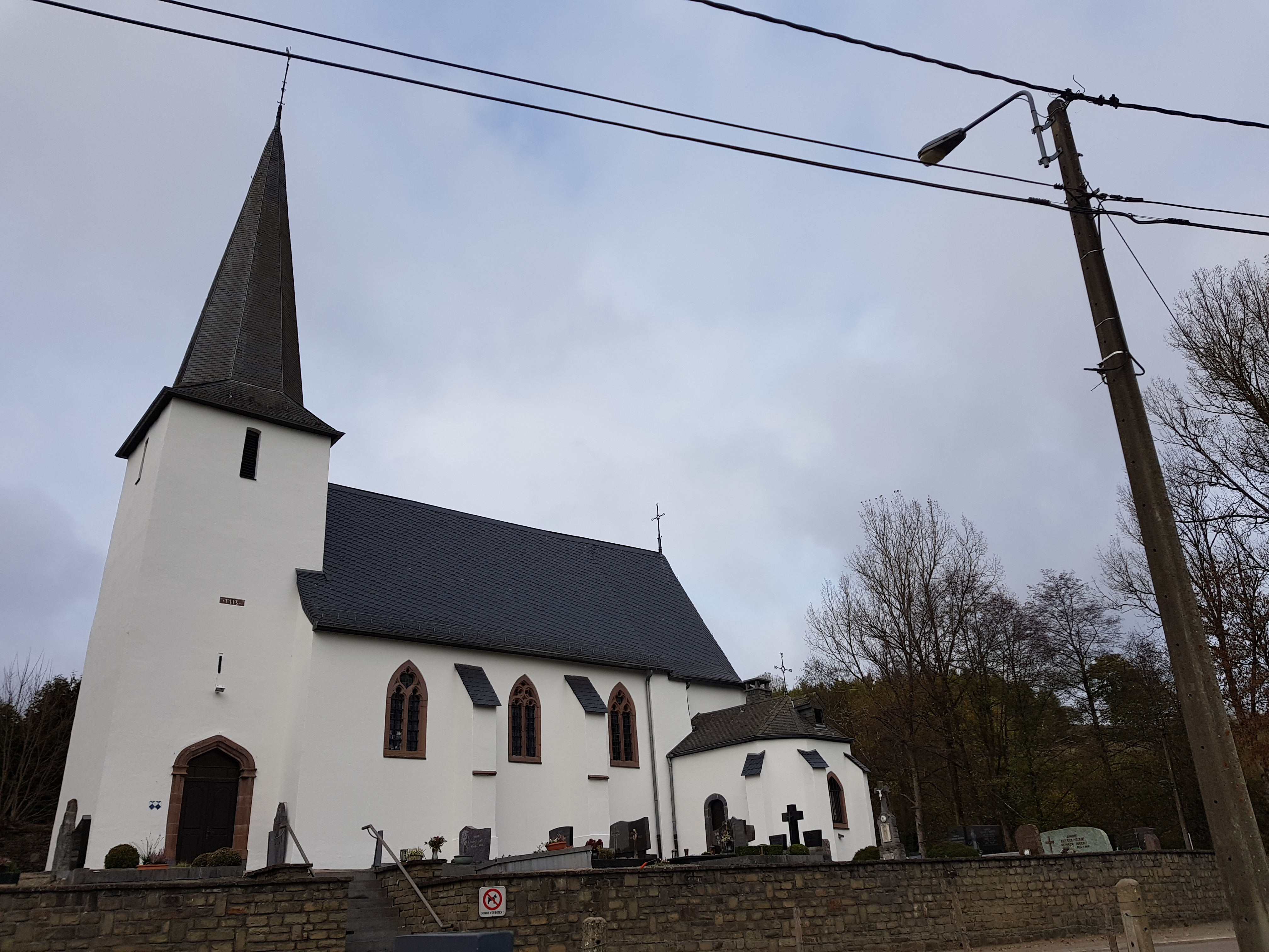 Kirche St. Laurentius, Mackenbach, Sankt Vith, Belgien This photo of immovable heritage has been taken in the Walloon Region